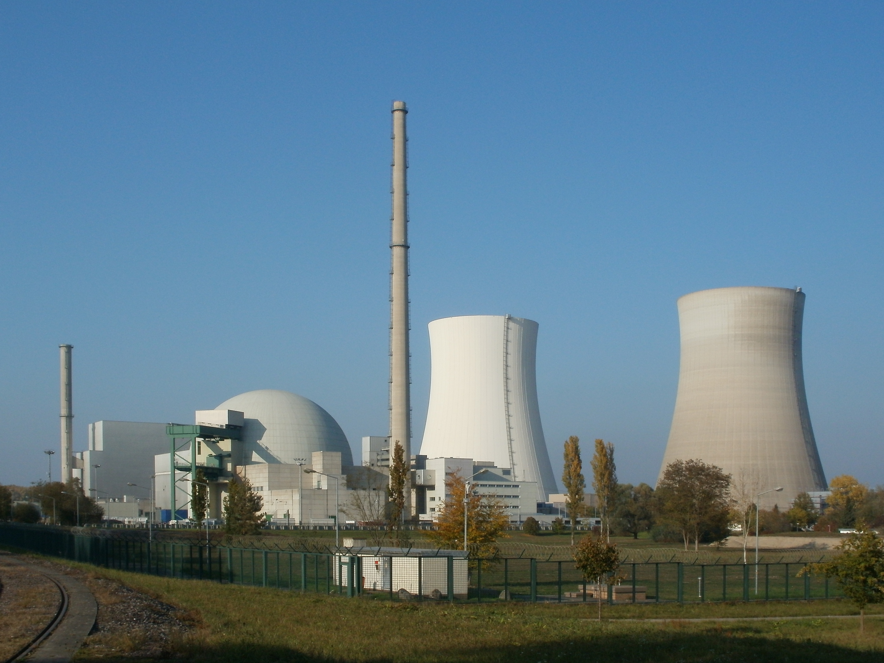 Kernkraftwerk Philippsburg